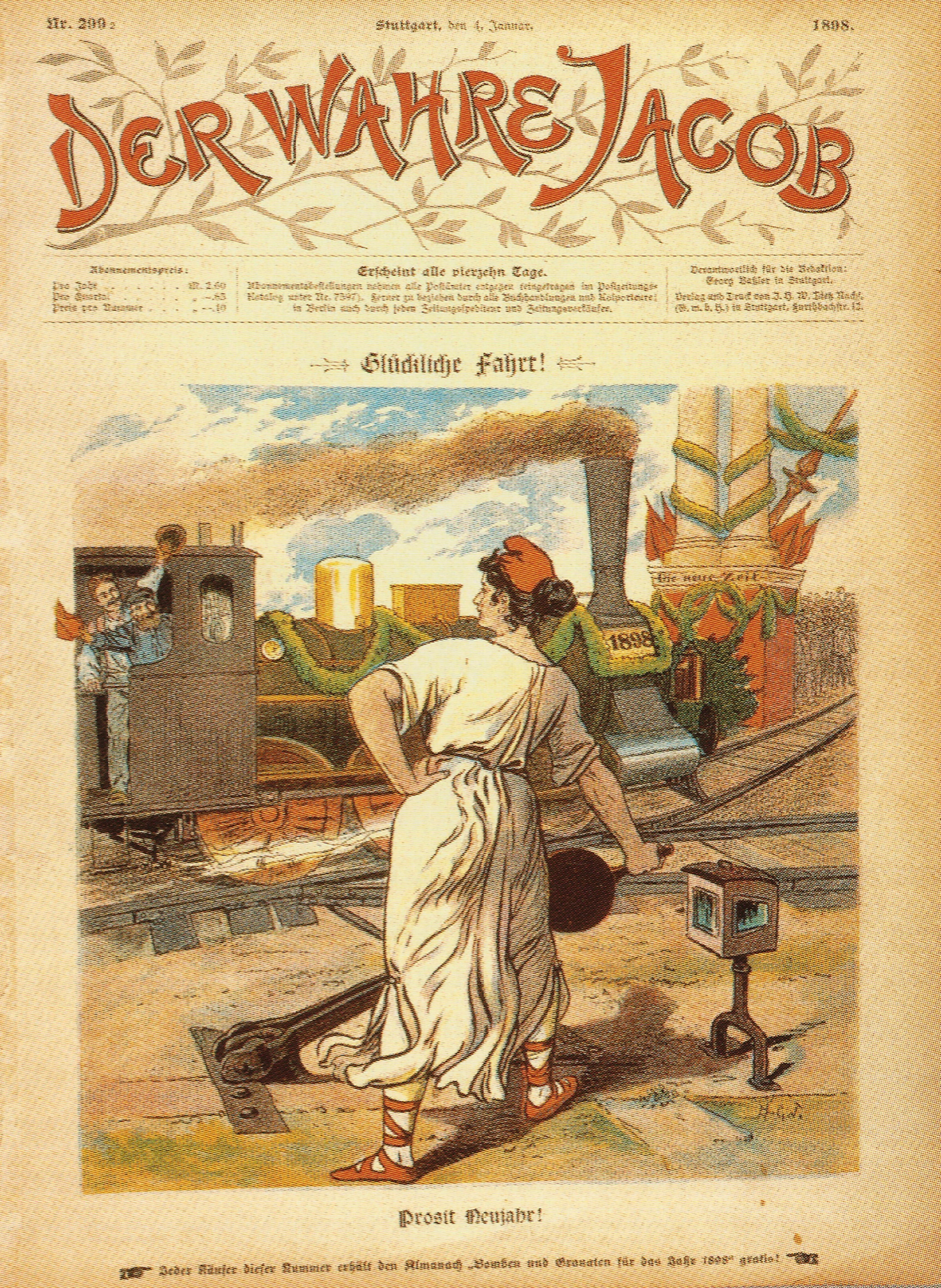 Titelseite der Satirezeitschrift Der Wahre Jacob, Nummer 299 vom 4. Januar 1898